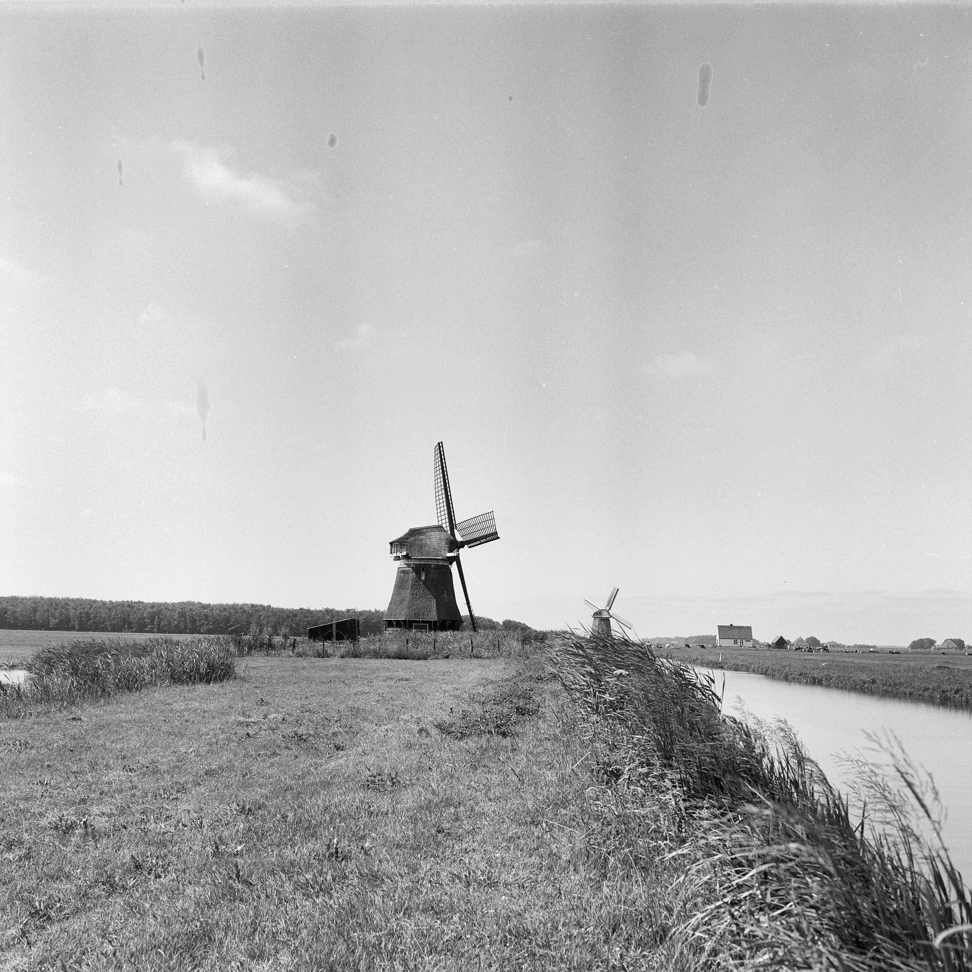 watermolen van de polder P., overzicht